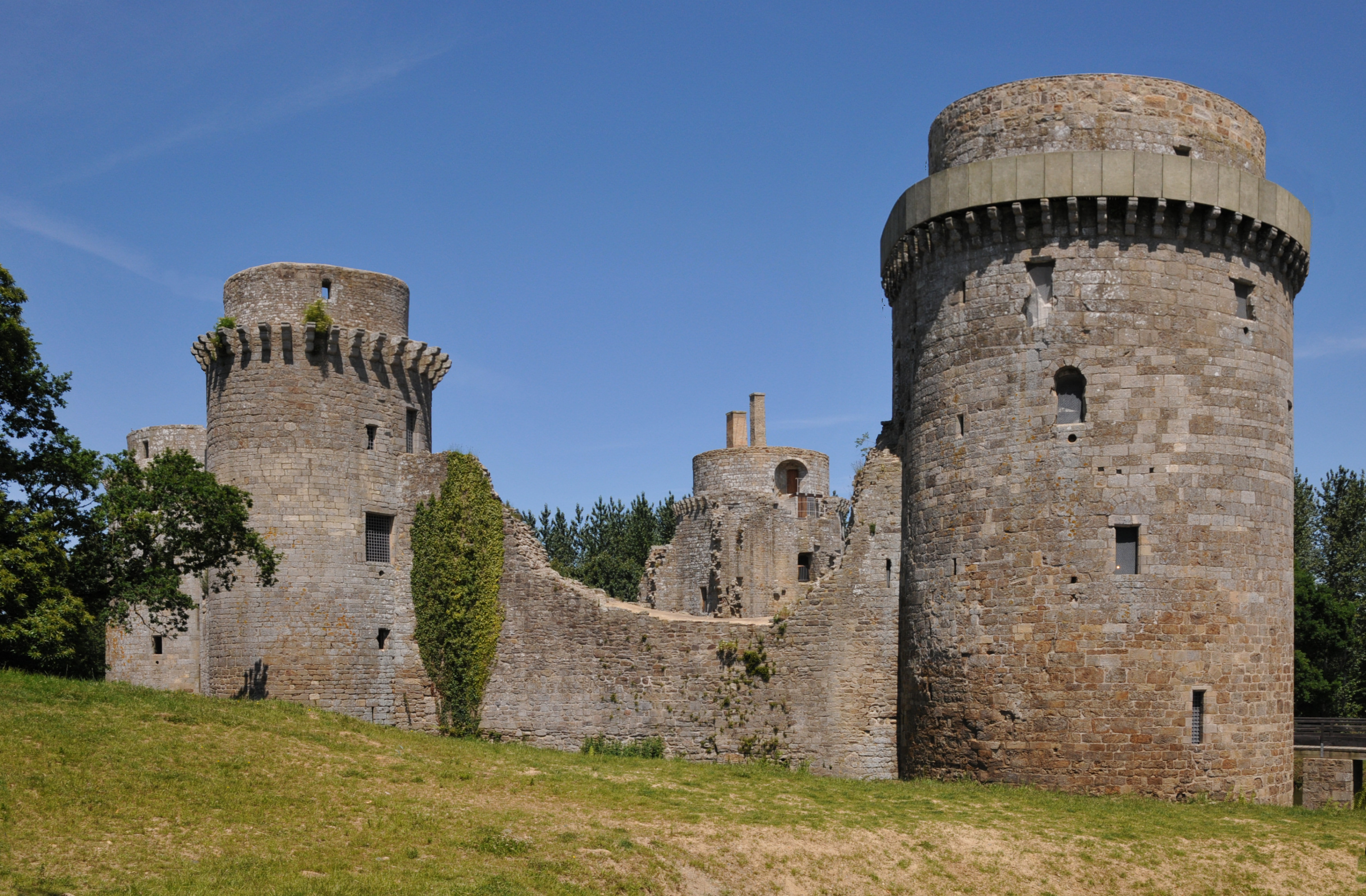 Burgruine La Hunaudaye von Südwesten gesehen